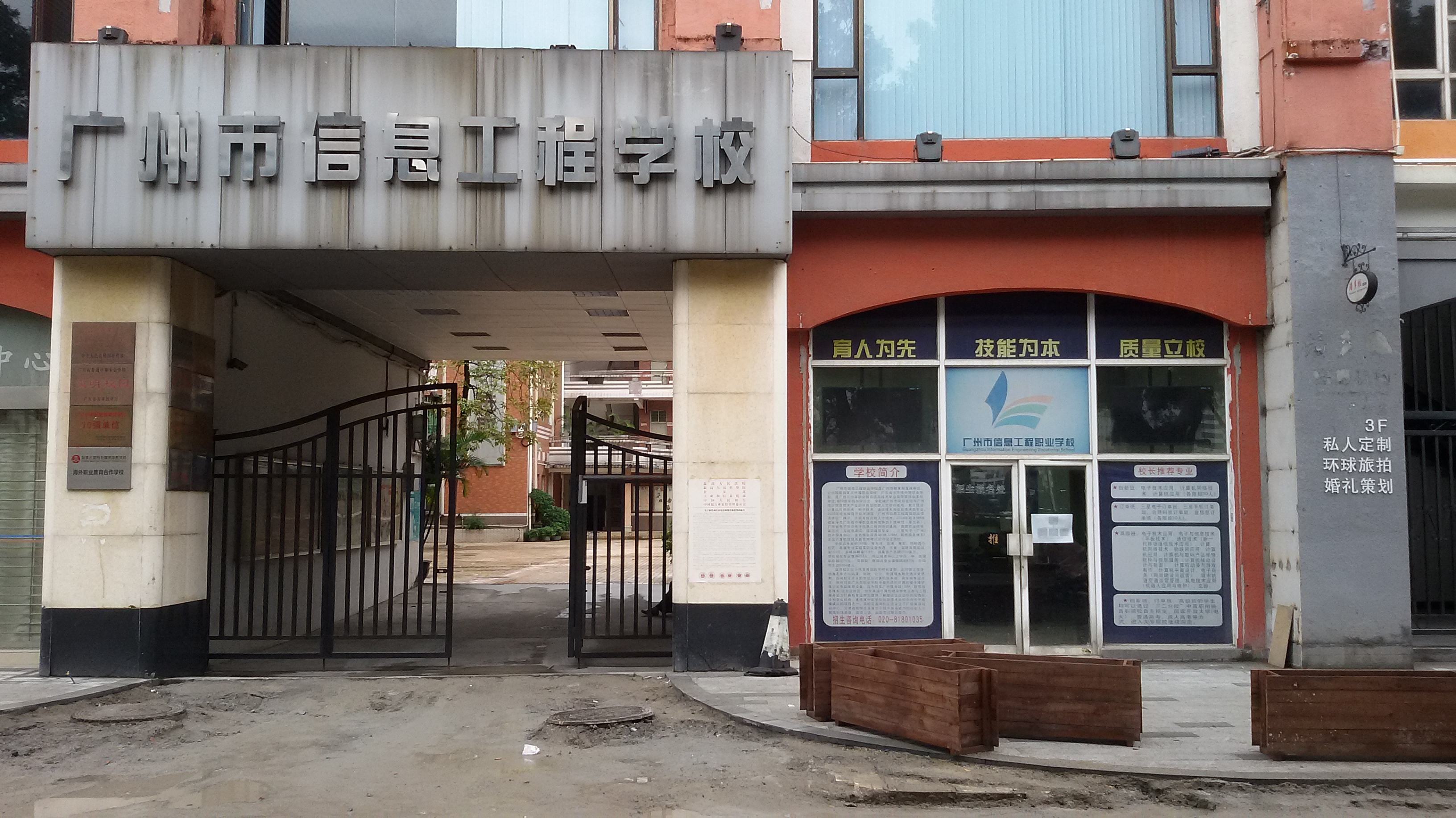 粵語: 廣州市信息工程職業學校嘅荔灣校區